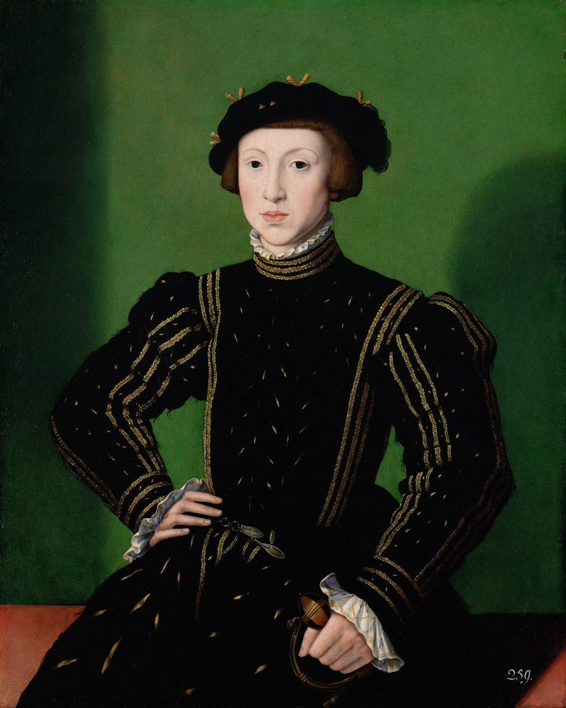 Bildnis in halber Figur als etwa Fünfzehnjähriger